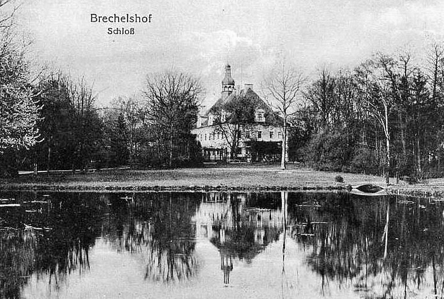 sunk palace in Brachów